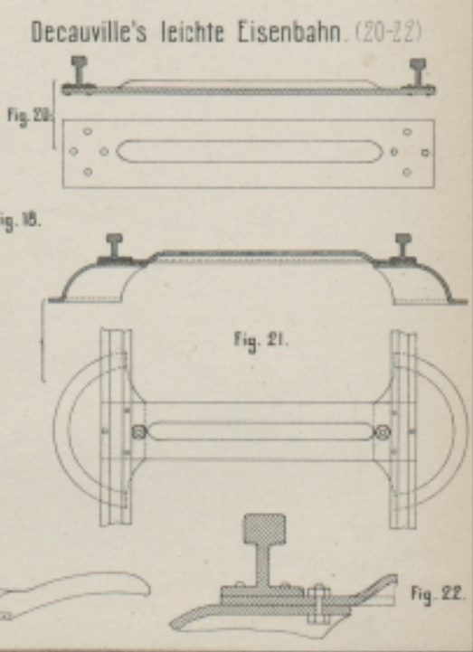 Decauville's leicht zu verlegende Eisenbahn. Mit Abbildungen auf Tafel 17. Decauville in Petit-Bourg, Frankreich, fertigt bei seiner leicht zu verlegenden Eisenbahn (vgl. 1878 227 310) neuerdings die Schwellen aus Stahl und versieht dieselben, wie in Fig. 20 Taf. 17 veranschaulicht ist, mit einer länglichen ausgebauchten Rippe, um ohne Gewichtsvermehrung die Steifigkeit zu erhöhen. Die Schienen werden wie früher mit den Schwellen unmittelbar vernietet und die einzelnen Stücke der Bahn ähnlich wie früher dadurch unter einander verbunden, daſs ein Schienenende zwei Laschen und das Ende der anliegenden Schiene ein zwischen diese Laschen tretendes Stahlplättehen erhält. Durch Löcher in den Laschen und dem Plättchen wird dann ein Stift gesteckt. Die so zusammengesetzte Bahn wird frei auf dem Erdboden verlegt; doch werden bei weichem Boden und besonders in Curven neuerdings die Schwellen noch durch schalenförmige Füſse (vgl. Fig. 21 und 22 Taf. 17) unterstützt. Dieselben werden in einem vierten Loche der Schwellen durch Schrauben mit diesen verbunden. Die Spurweiten werden je nach dem Zwecke zu 0m,5, 0m,55 und 0m,6 und die Schienenstärken entsprechend gewählt. 1m Länge der Schienen wiegt 4k,5, 7k, 9k,5 und 12k. Ein Stück Geleise von 5m Länge wiegt bei einem Schienengewichte von 4k,5 für 1m Länge und einer Spurweite von 0m,5 nahezu 50k, so daſs es noch leicht von einem Manne getragen und verlegt werden kann. (Vgl. Freudenberg 1879 231 89. Brunon 1879 232 * 197.)